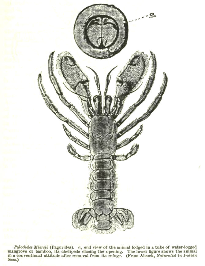 Pylocheles miersii (=Xylocheles miersi)